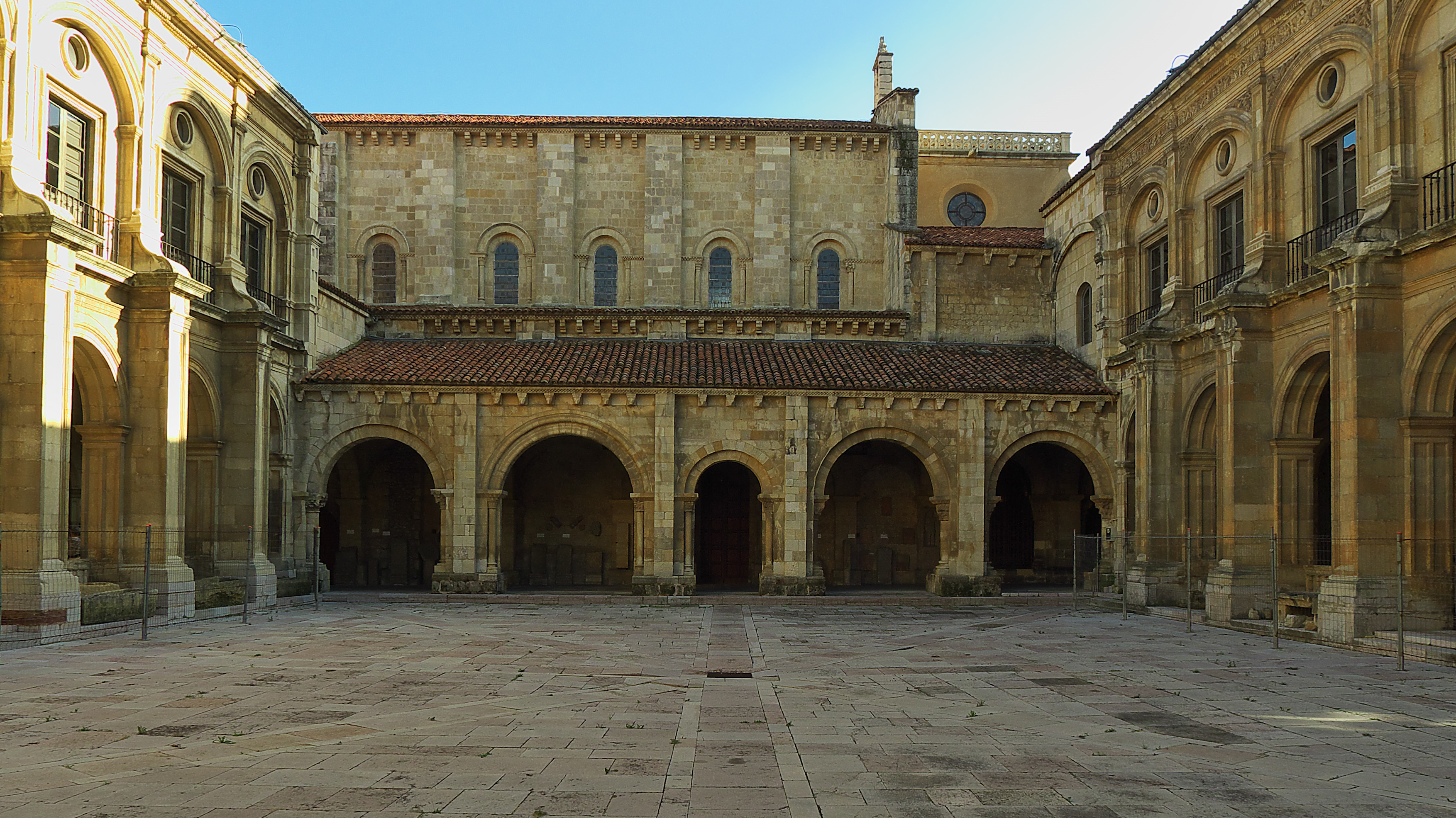 A finales del siglo XI (ca. 1090) se añade a la iglesia un pórtico románico.